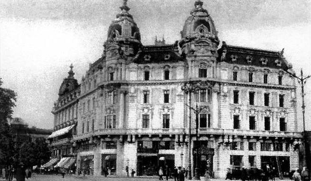 Vedere a fostei clădiri a Academiei de Înalte Studii Comerciale şi Industriale din Bucureşti